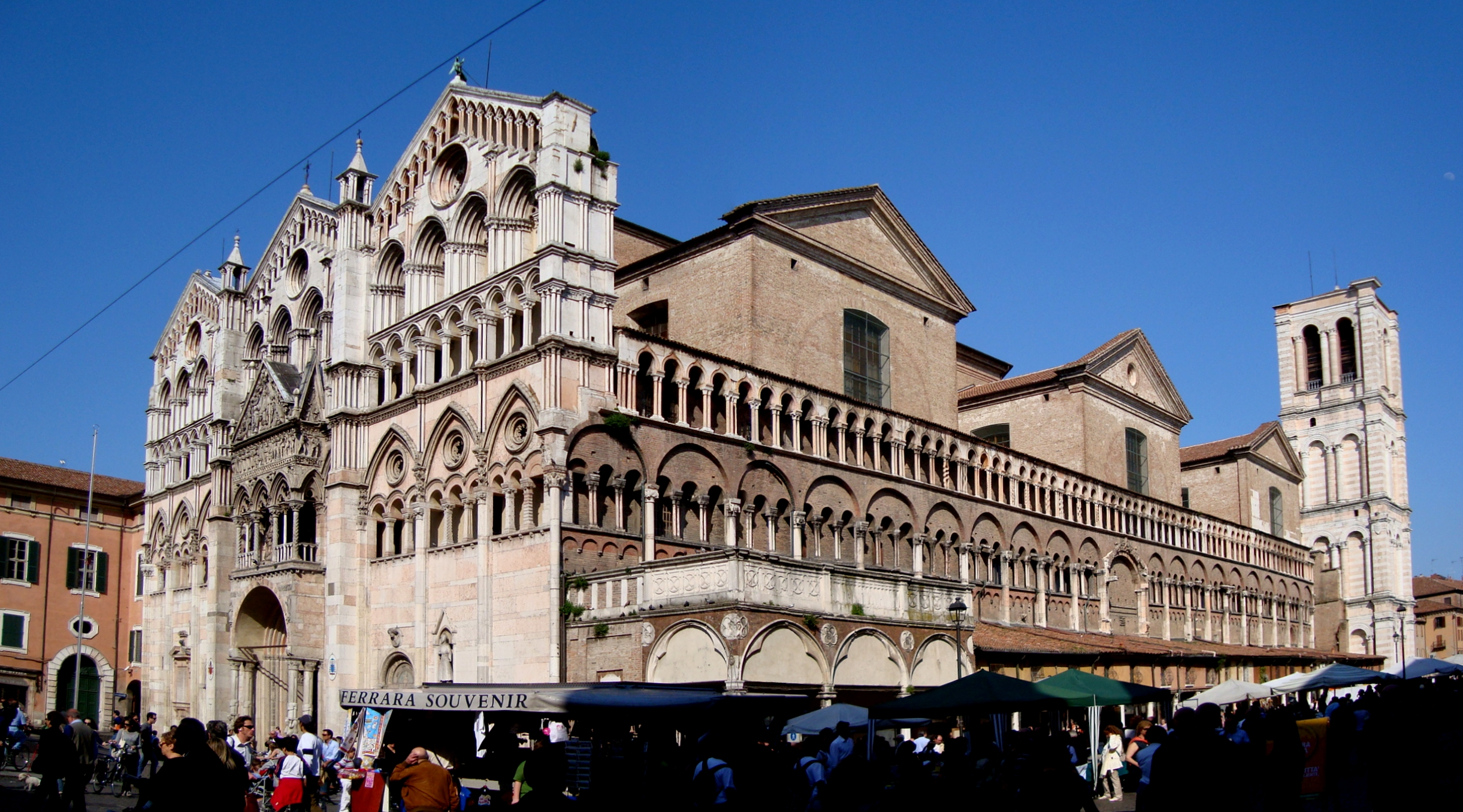 La cathédrale San Giorgio de Ferrare (Italie).